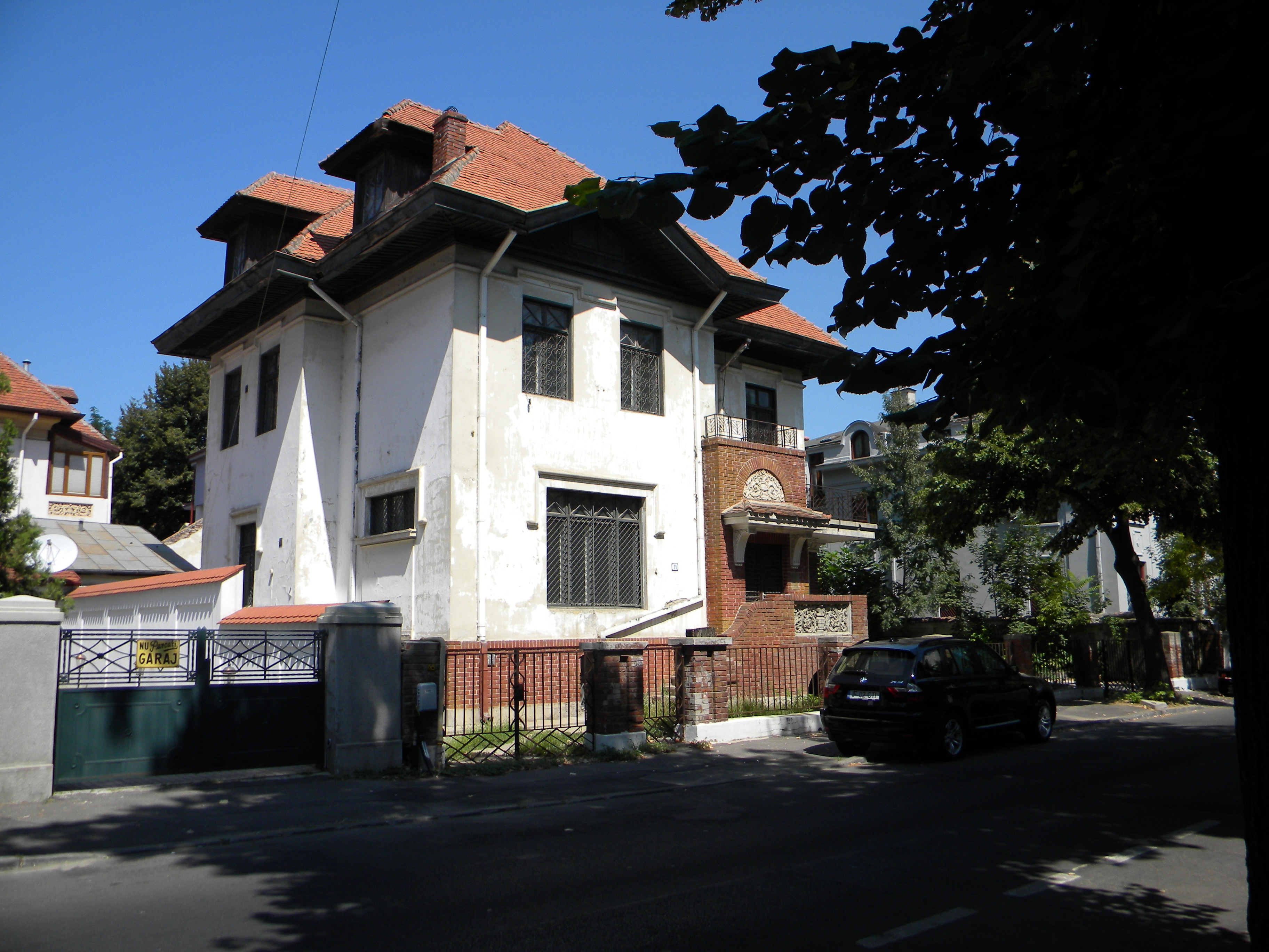 Vila pe Strada Sofia nr. 11, Bucuresti, sect. 1